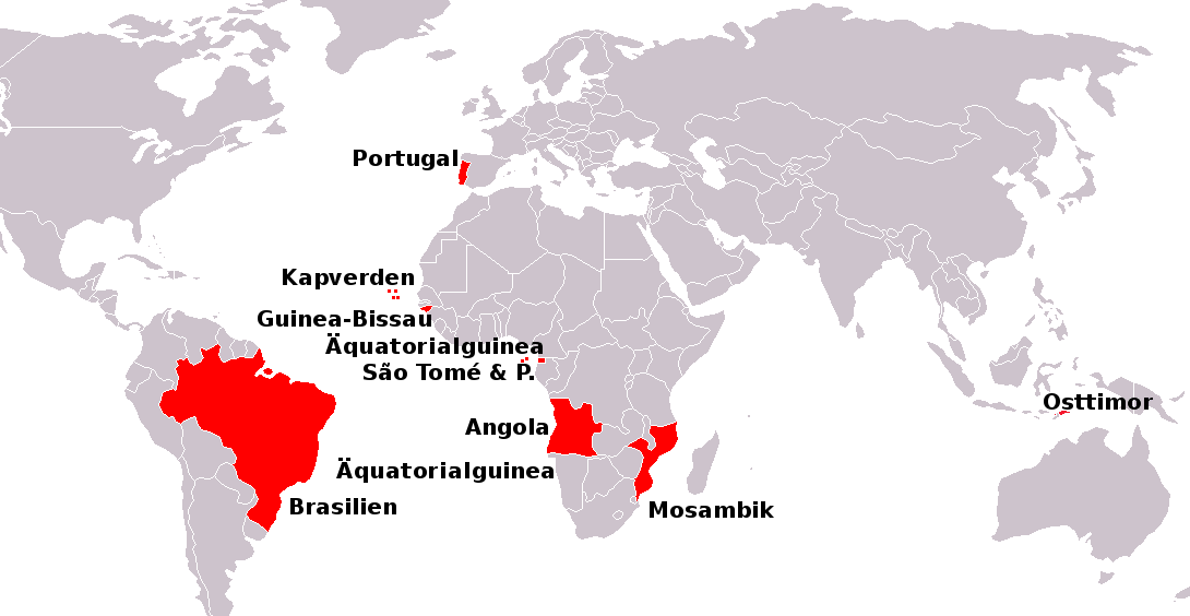 Lage der CPLP-Mitgliedsstaaten.